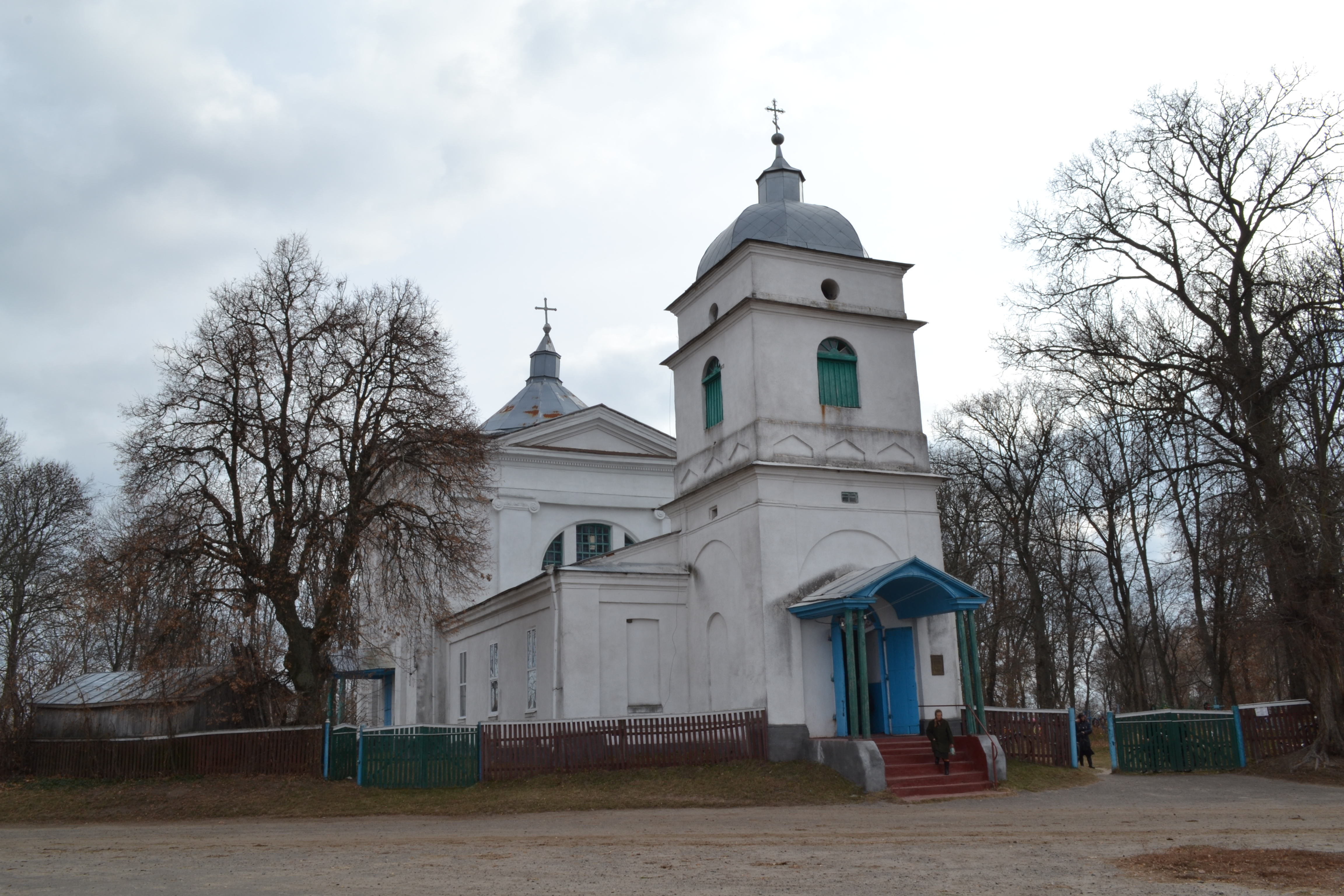 с. Стольне, Менський район, Чернігівська область